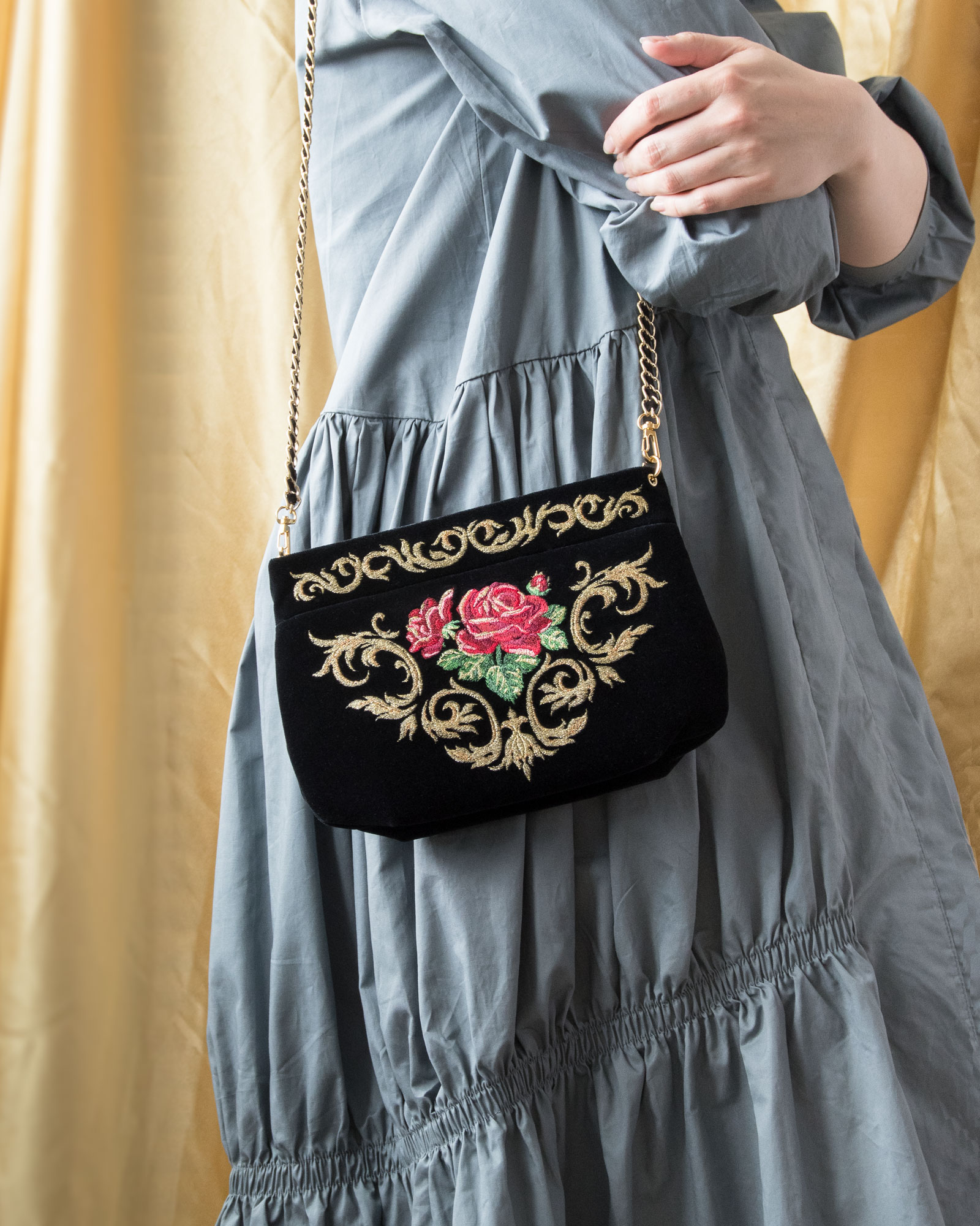 Бархатная сумка с золотой вышивкой.